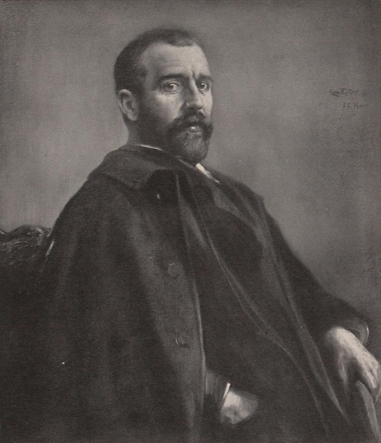 Caspar Ritter: Bildnis des Schriftstellers Jakob Christoph Heer